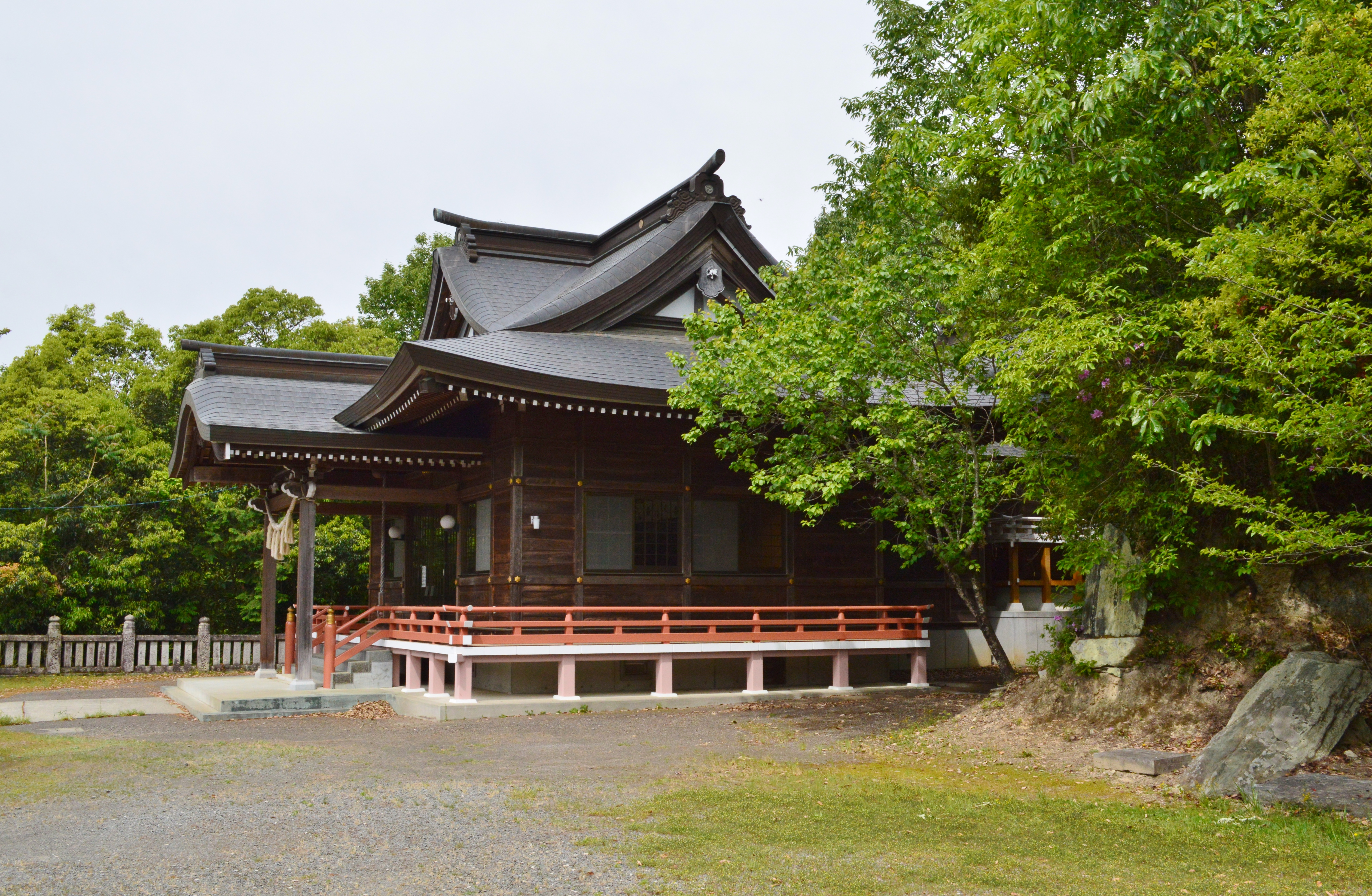 野村八幡神社 拝殿 Nikon D3200